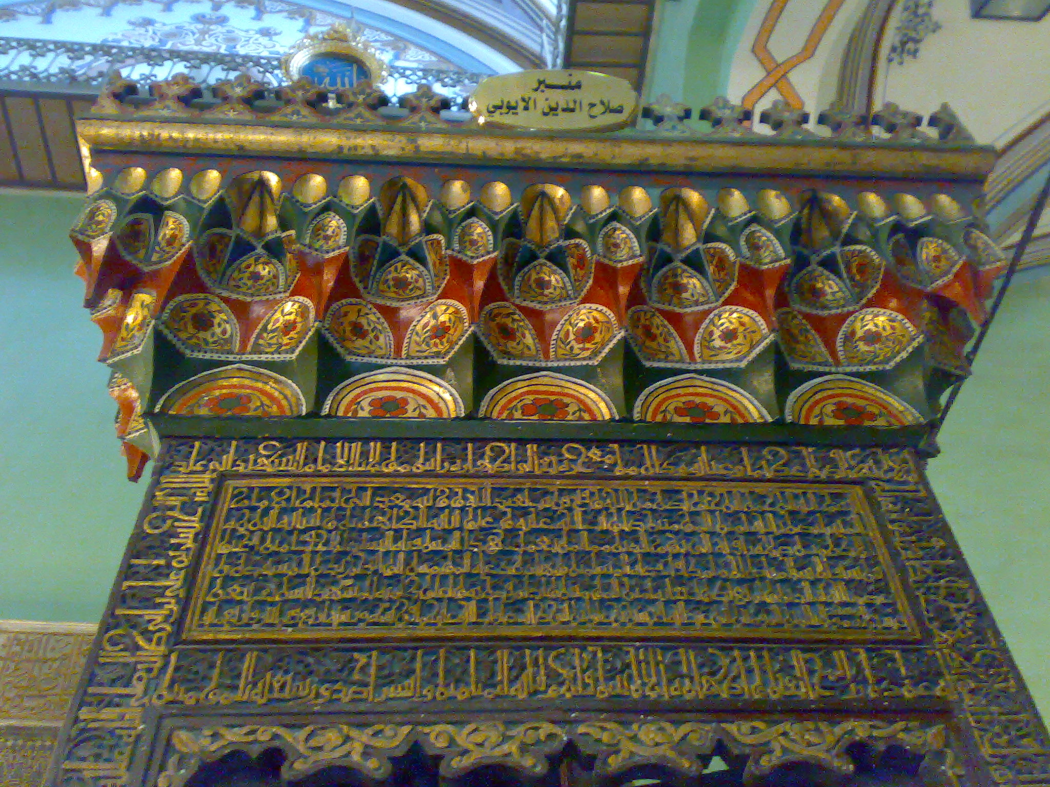 Saladin Minbar in Al-Haram Al-Ibrahimi